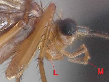 Some species of Caddisfly (Halesus cf. tesselatus) Location: Soderstorf (Lüneburger Heide), Germany Keywords: trichoptera, caddisfly --- nl: Eén of andere Schietmot Locatie: Soderstorf (Lüneburger Heide), Duitsland Trefwoorden: schietmot, kokerjuffer --- de: Irgendeine Art Köcherfliege